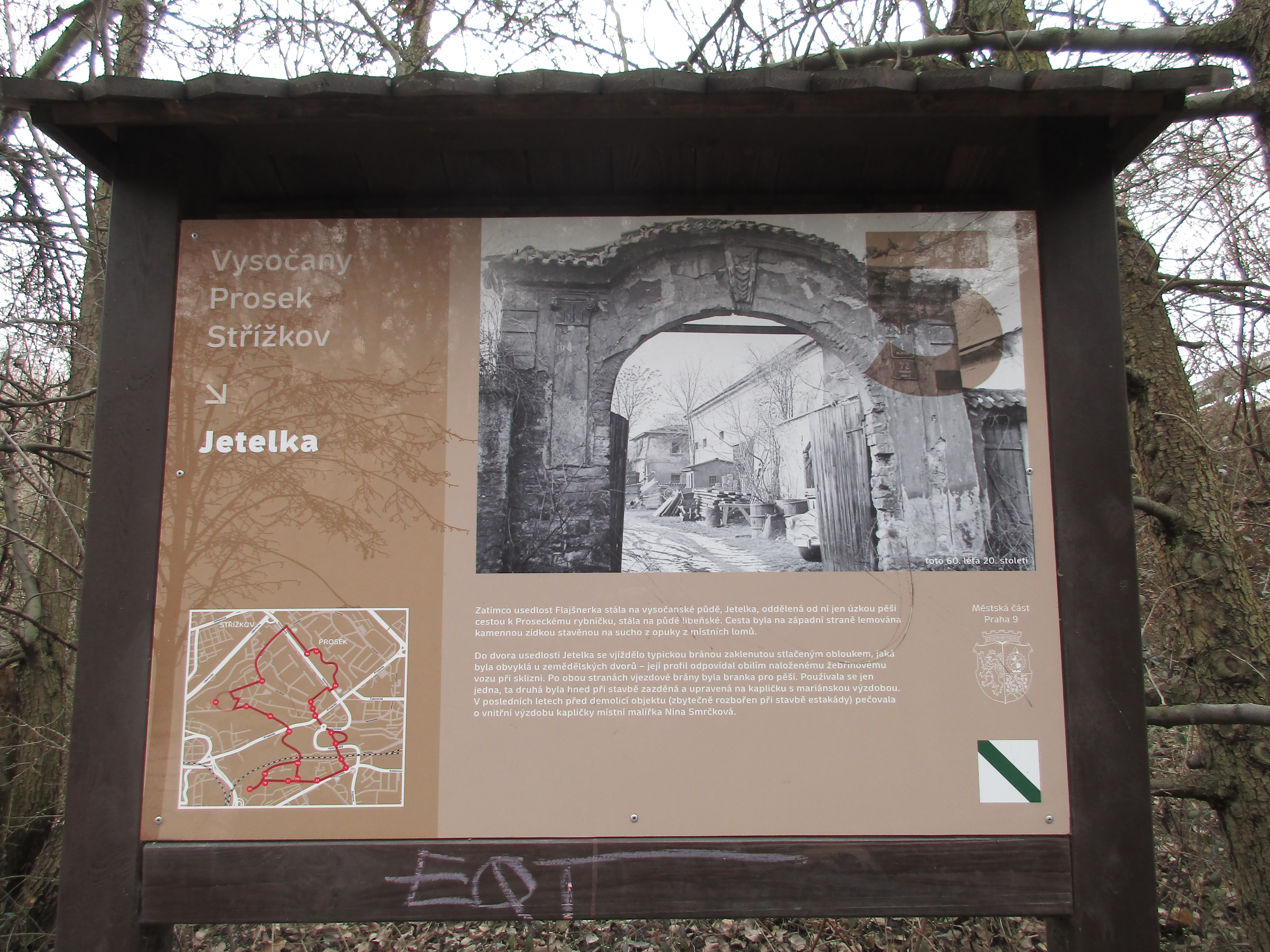 Turistický vlastivědný okruh Vysočany - Prosek - Střížkov. Tabule č. 5: Jetelka.